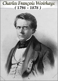 シャルル・フランソワ・ヴォワレイ((1798-1878)